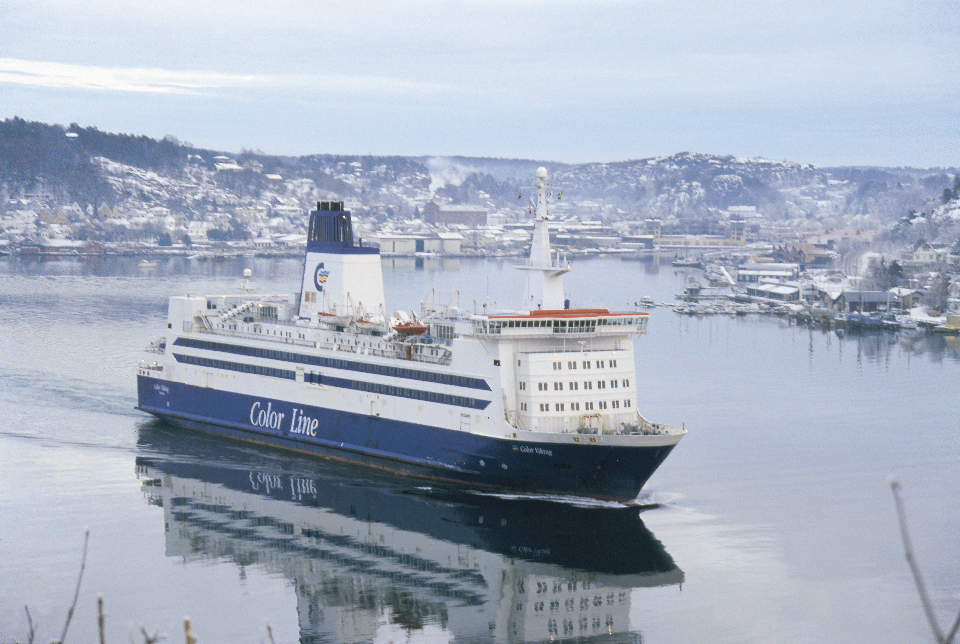 Color Viking trafikkerer linjen Color Line betjener mellom Sandefjord – Strømstad. Color Viking sailes on the route Color Line operate between Sandefjord – Strømstad. Photo: Dag G. Nordsveen/nordsveen.net